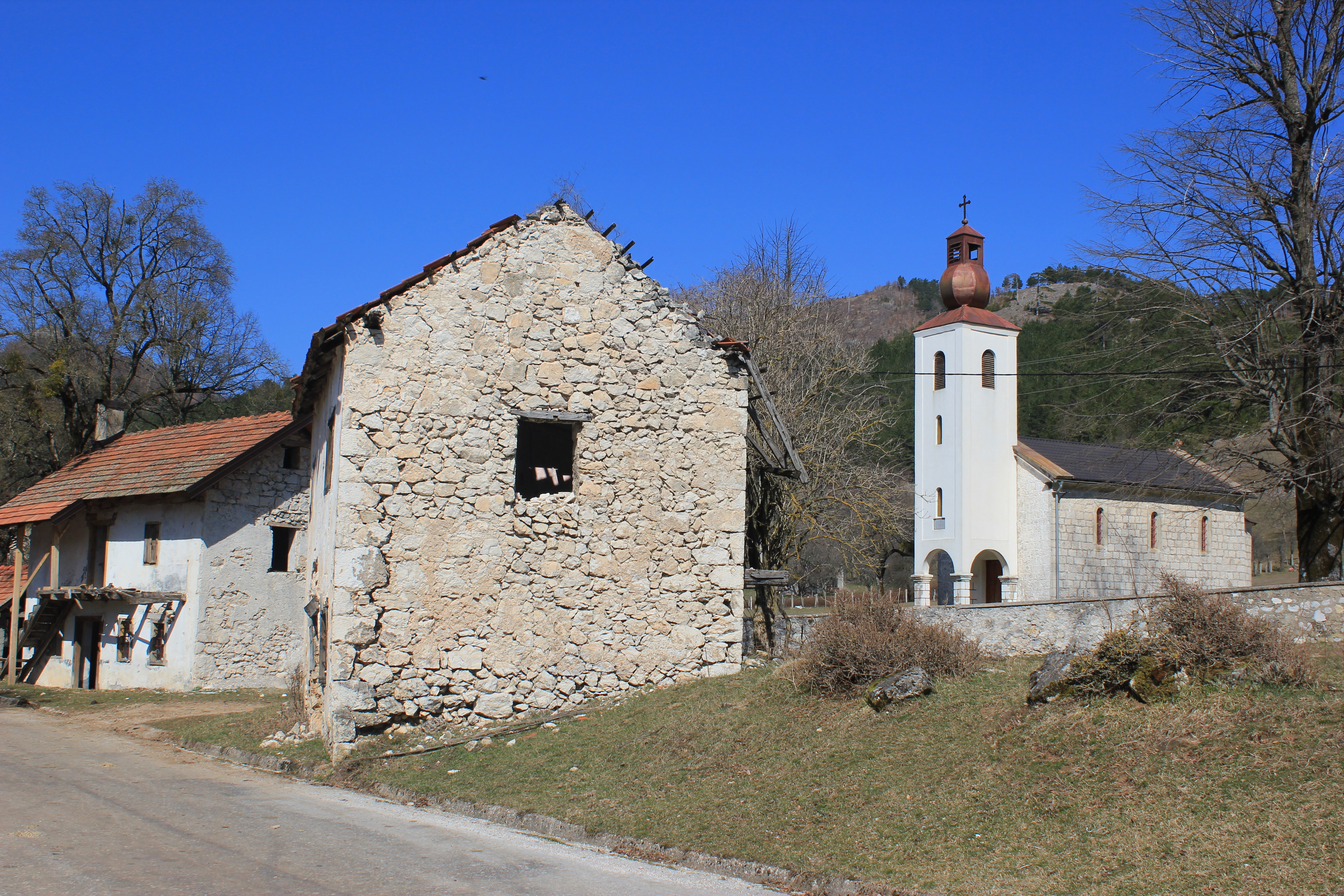 Im Dorf Borci (Gemeinde Konjic, Bosnien und Herzegowina).